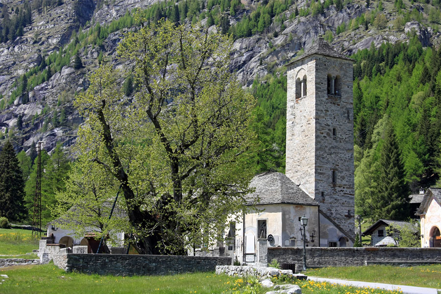 Macugnaga, La chiesa vecchia ed il tiglio monumentale